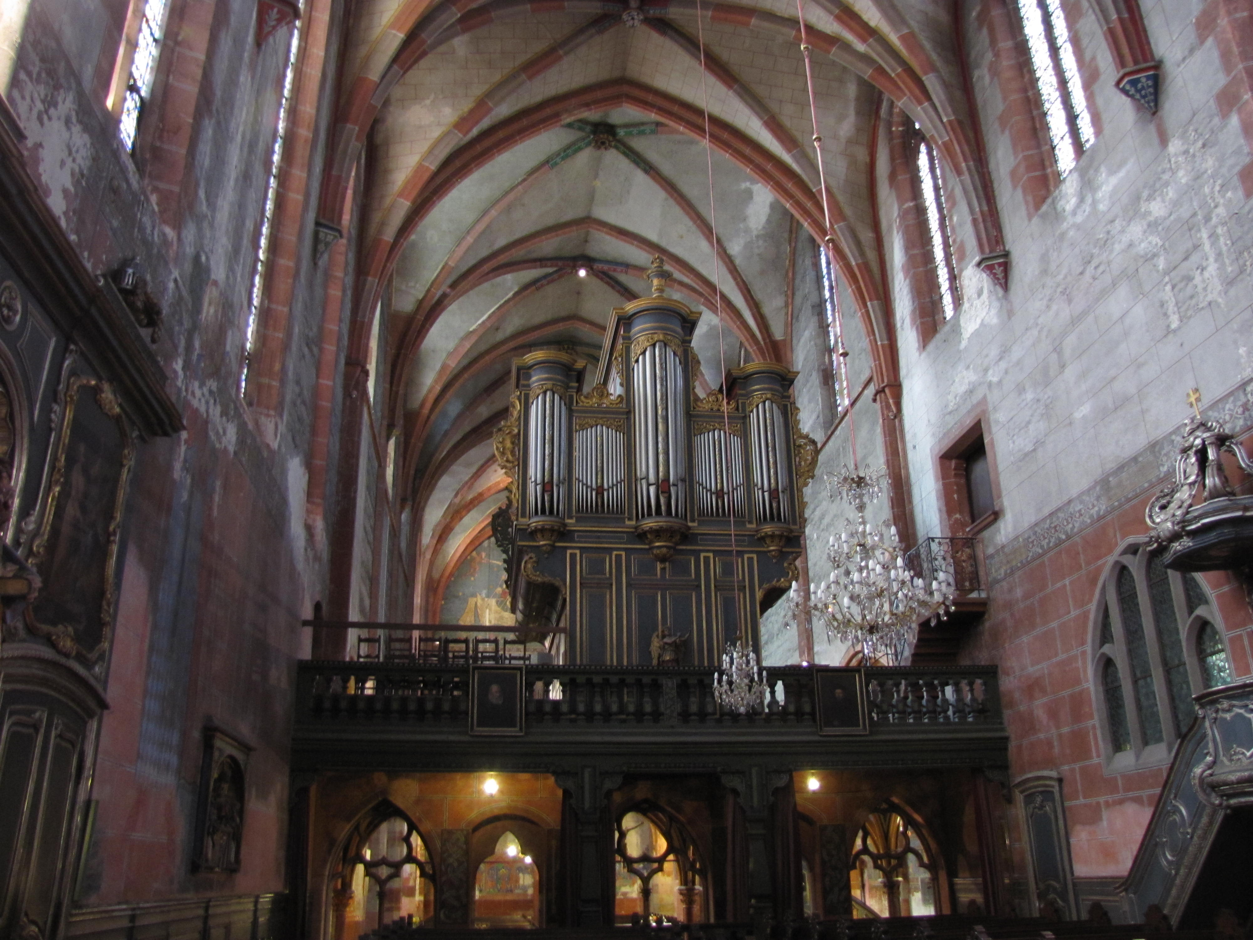 Alsace, Bas-Rhin, Église protestante Saint-Pierre-le-Jeune de Strasbourg (PA00085030): Ancien chœur catholique (église simultanée). Orgue Jean-André Silbermann (1780) sur jubé, façade côté chœur: This object is classé Monument Historique in the base Palissy, database of the French furniture patrimony of the French ministry of culture, under the references PM67001136 and buffet PM67000505 buffet.